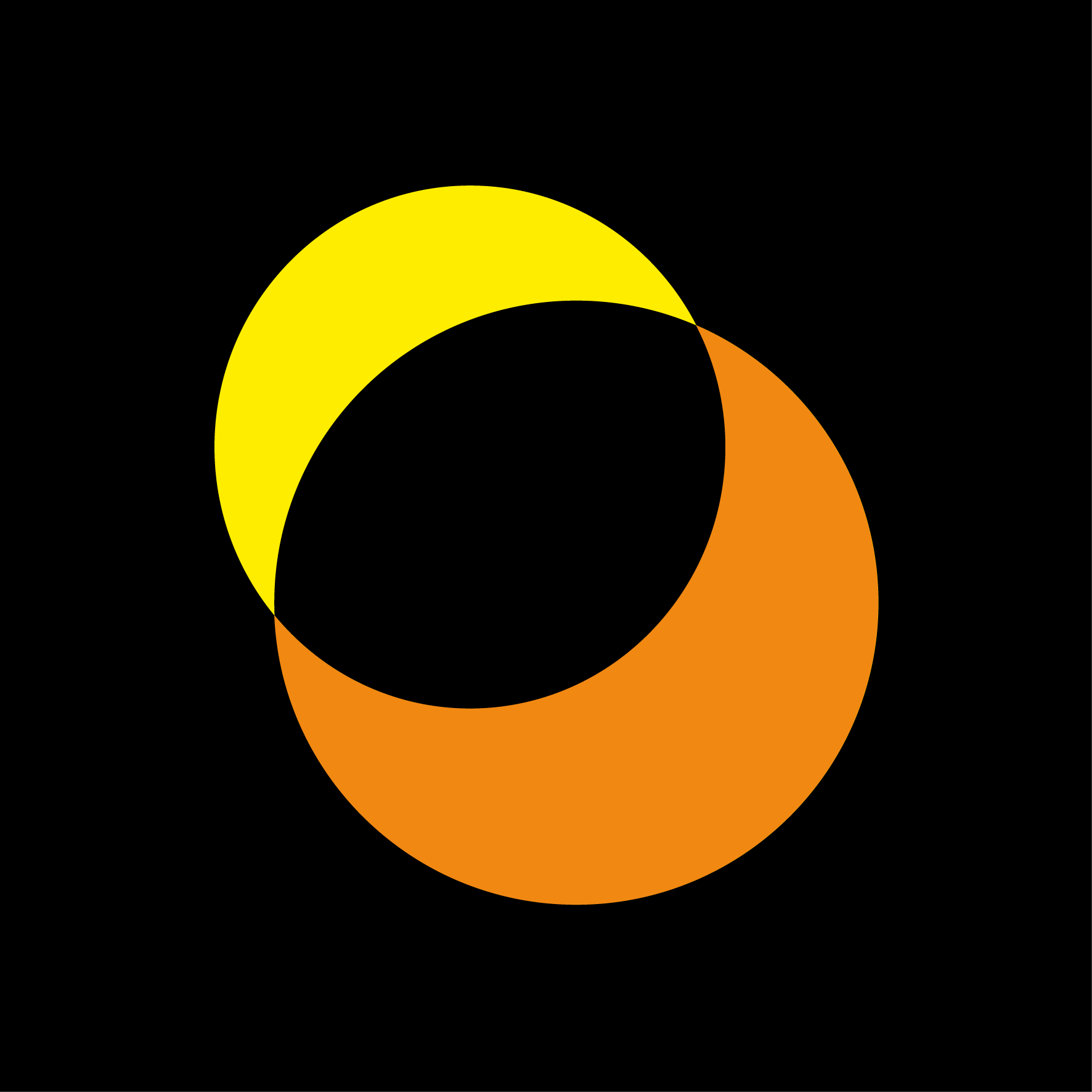 Koulun logo